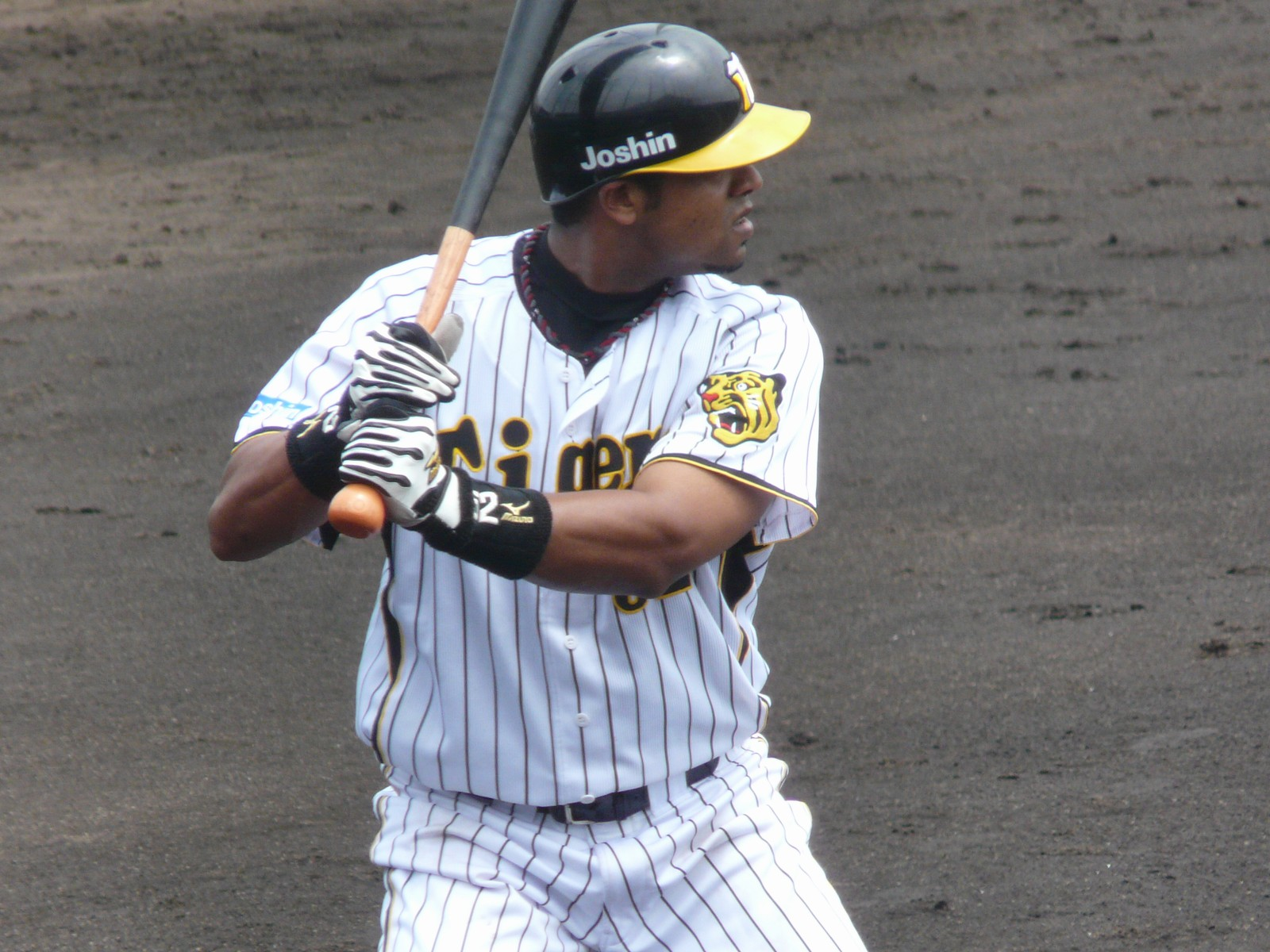 Copied from 画像:HT-Aarom-Baldiris-1.jpg: "アーロム・バルディリス"